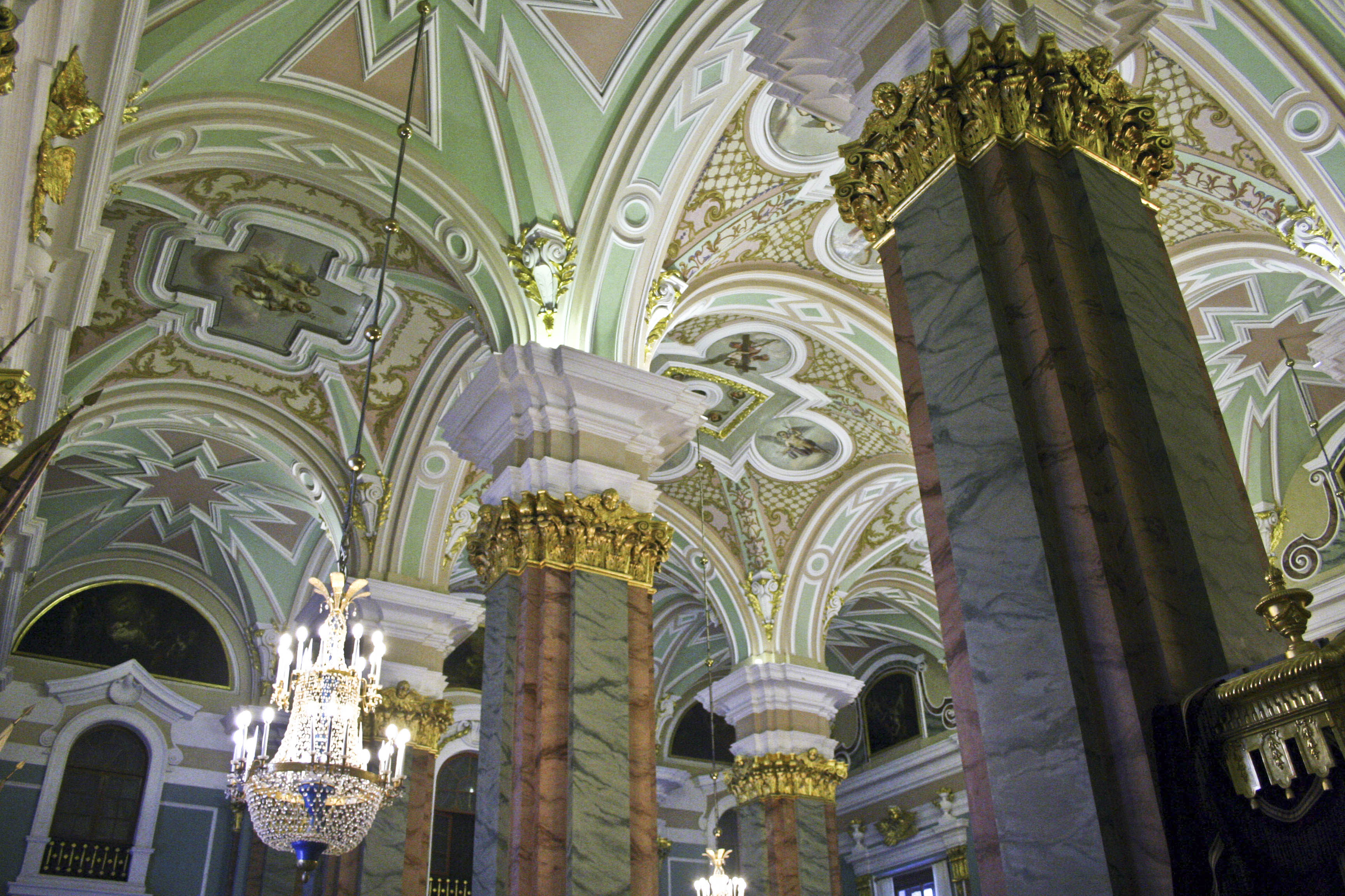 Intérieur de la cathédrale Saint-Pierre et Saint-Paul, Saint-Petersbourg (Russie)